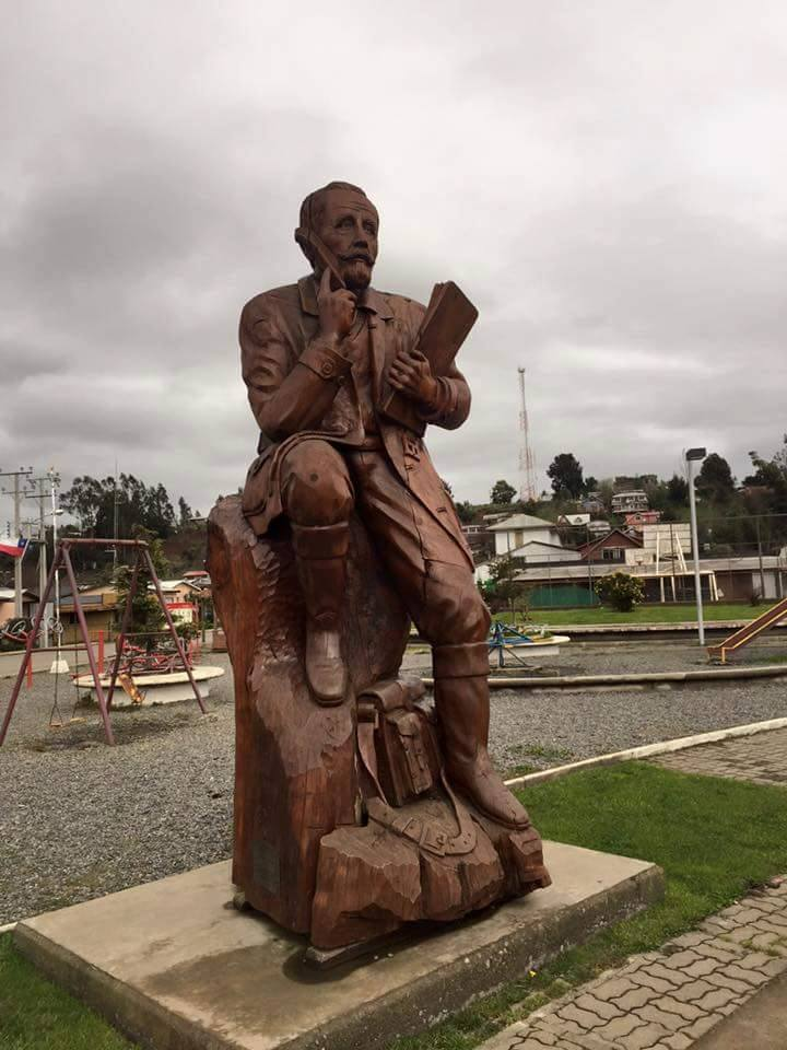 Augusto Winter, poeta del lago Budi, obra de Ildefonso Quilempán, escultor mapuche fallecido en un accidente de tránsito el 27 de noviembre de 2017.